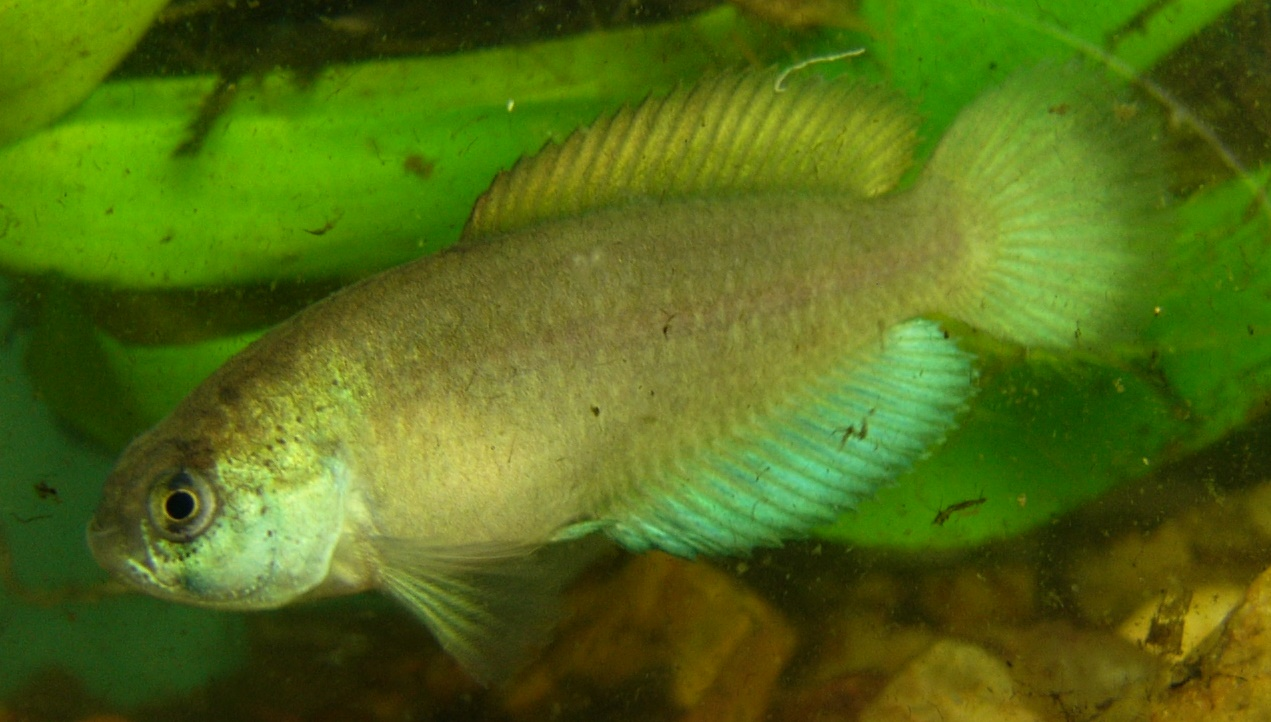 Foto de acuario, Marcelo Loureiro